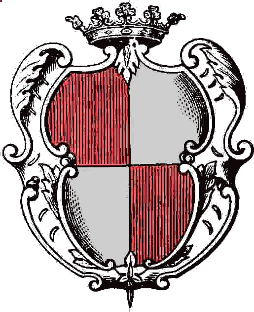 Stemma araldico del Ducato di Gaeta